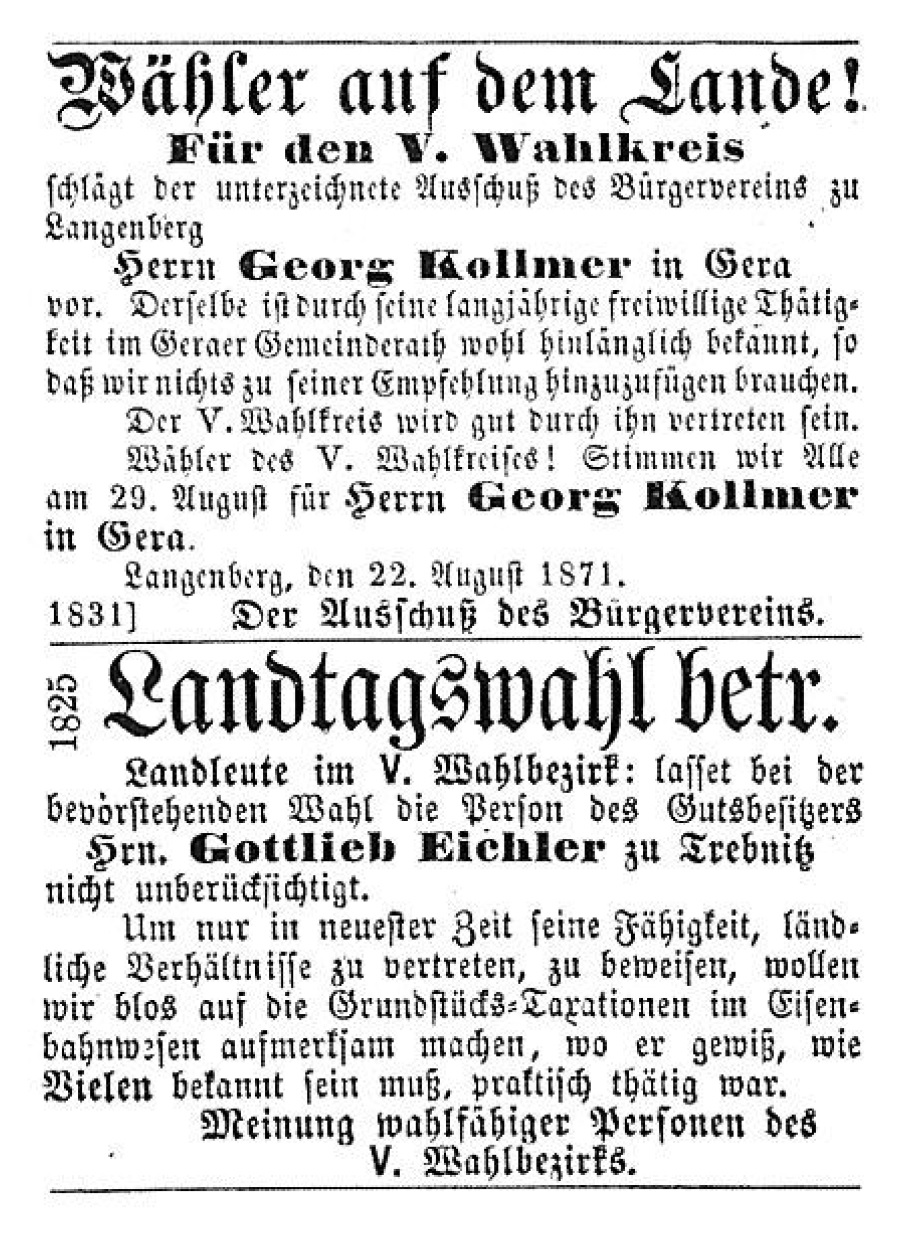 Anzeige zur Landtagswahl 1871